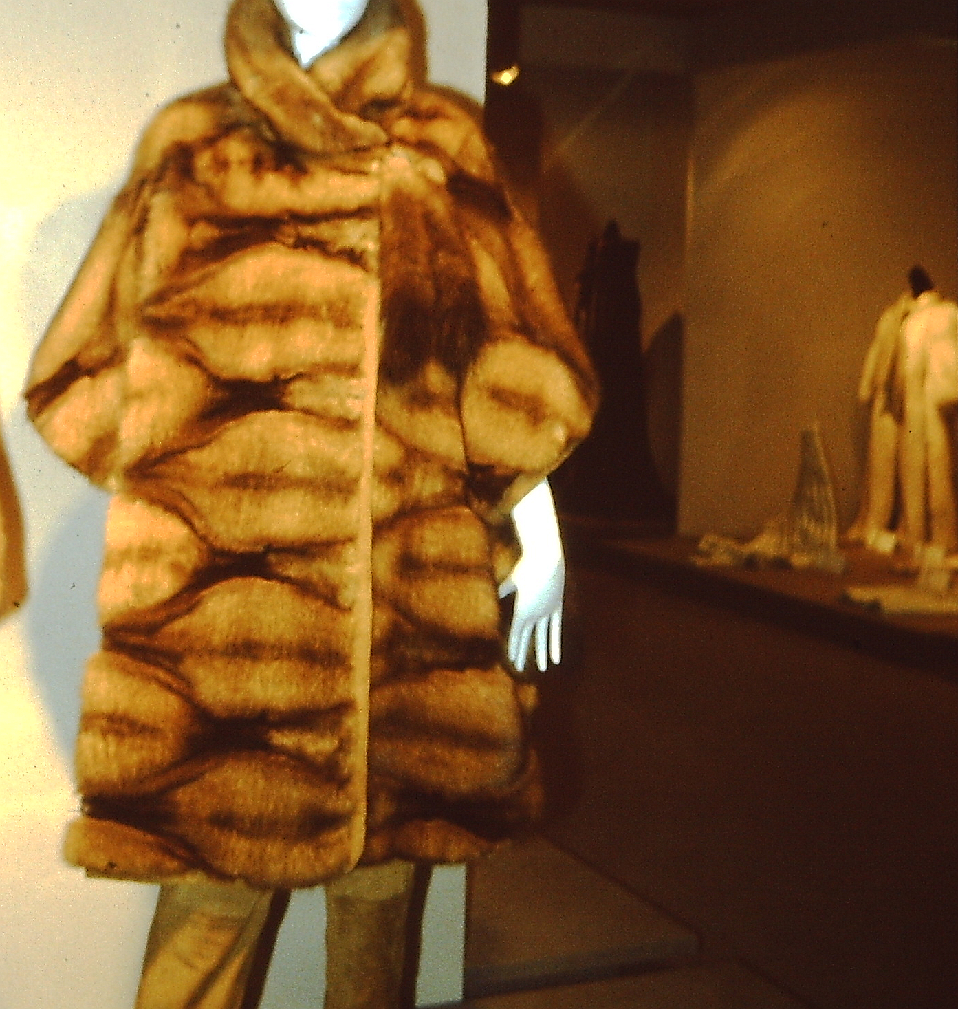 Leistungswettbewerb des Kürschnerhandwerks, Leistungsschau 1982, anlässlich der Pelzmesse in Frankfurt am Main. Zobelmantel der Firma Herhold, Wiesbaden.